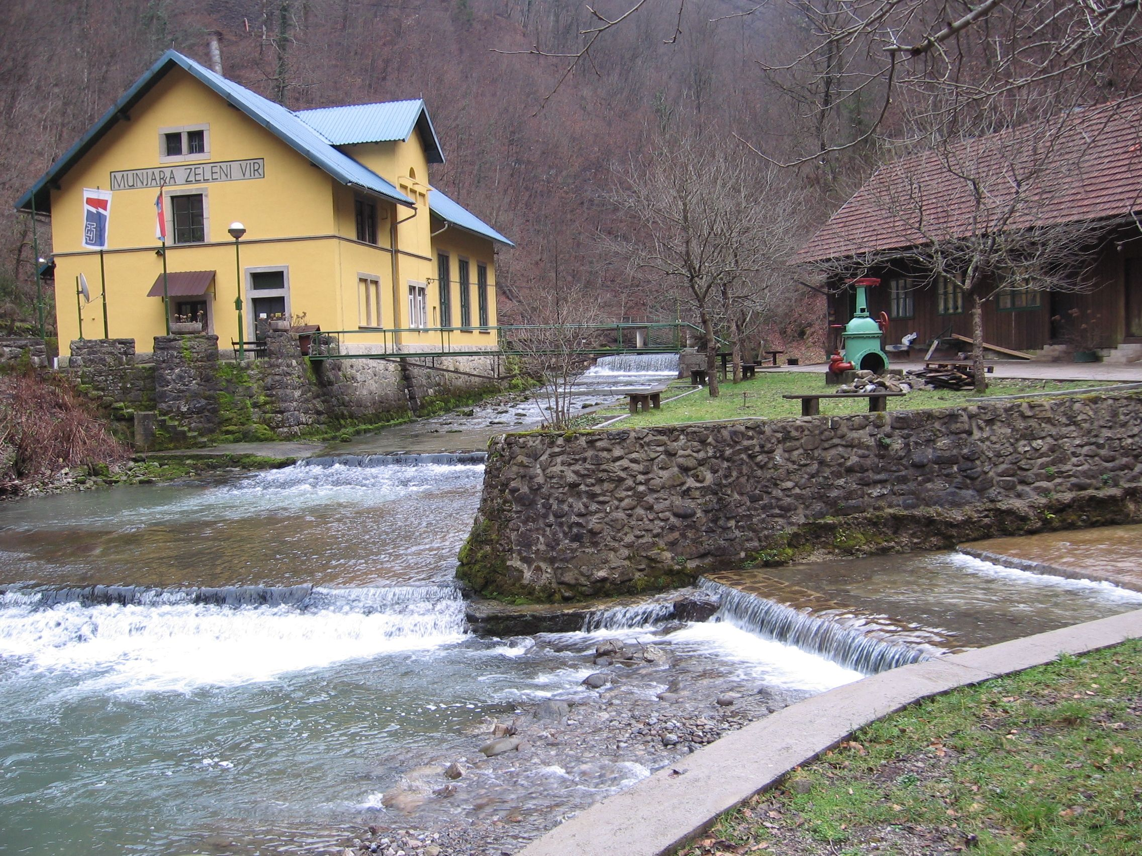 Zeleni Vir, zaštičeni rezervat prirode nedaleko od Skrada sa izvorom Zeleni vir, kanjonom Vražji prolaz i spiljom Muževa hiža